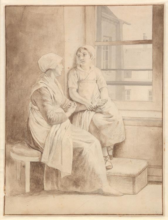 C.W. Eckersberg (1783-1853), Mor og datter - Eckersbergs vaertinde i Paris (?), 1811-1813